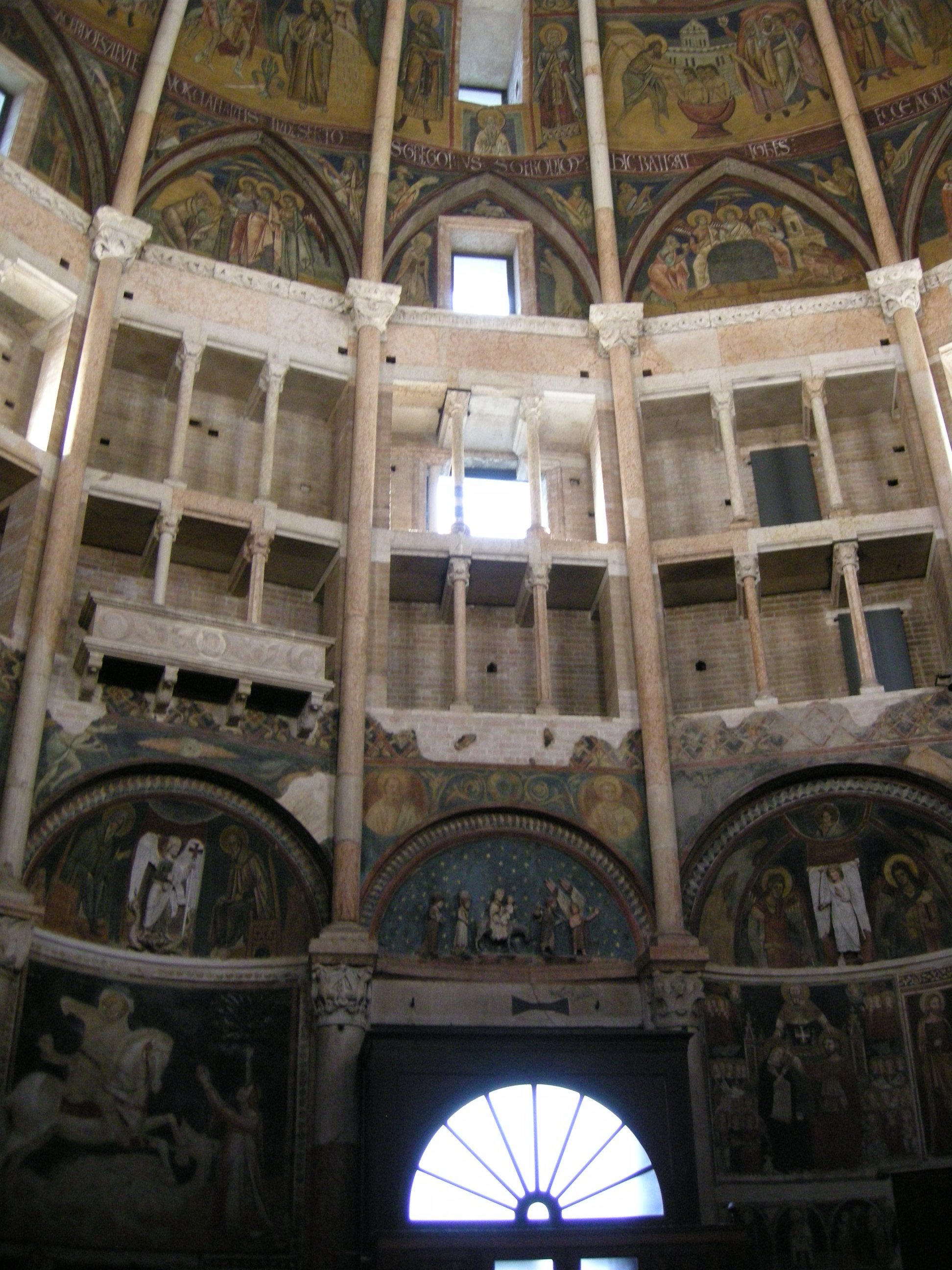 Battistero di parma, interno